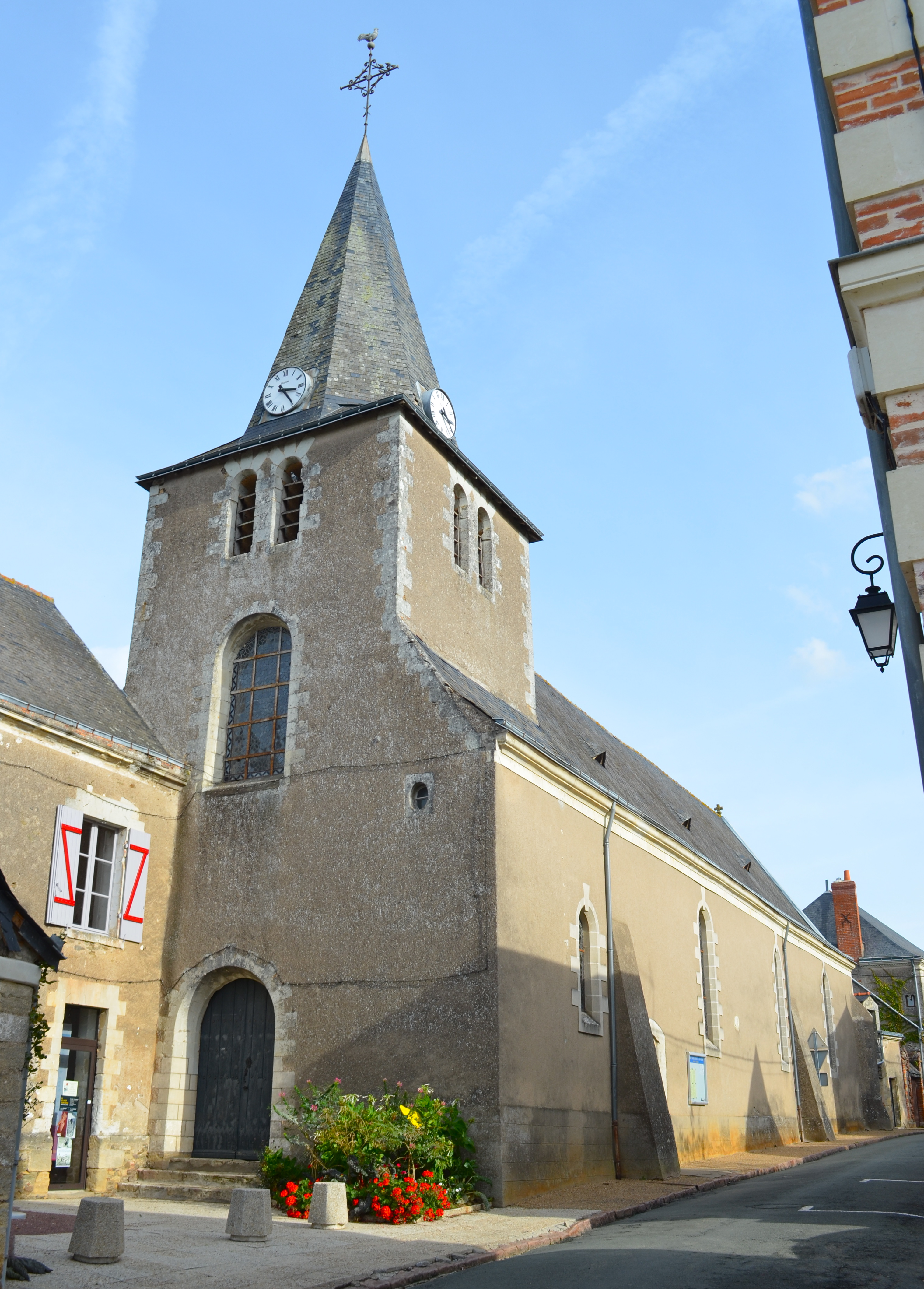 Eglise de Rablay-sur-Layon - (Maine-et-Loire)